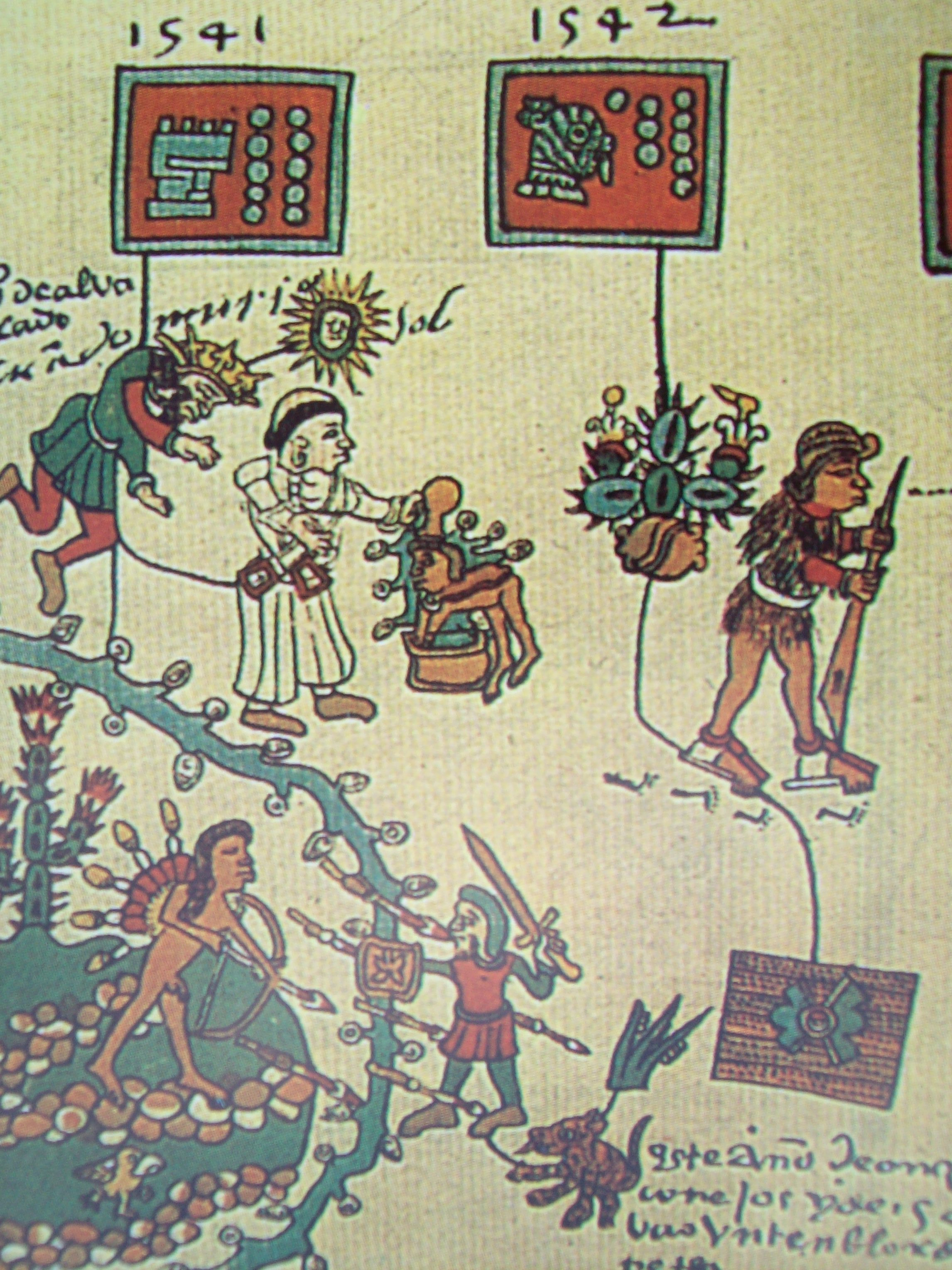 Francisco Tenamaztle se enfrenta al virrey Antonio de Mendoza durante la Guerra del Miztón. Códice Telleriano Remense